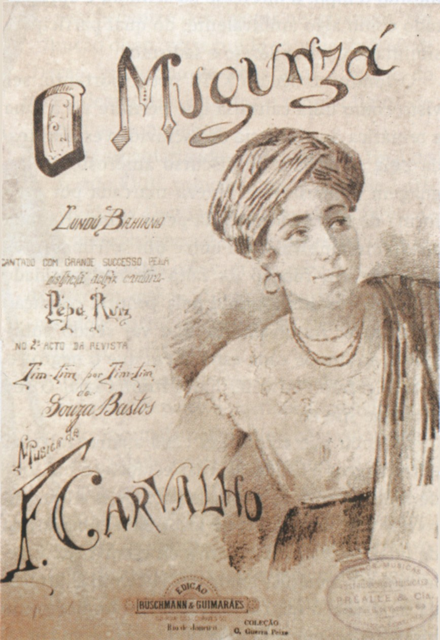 Capa de O Mugunzá, revista de partitura de lundu, Rio de Janeiro, Brazil